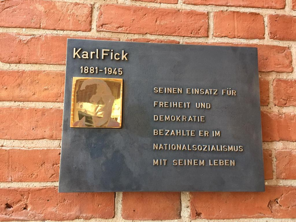 Gedenktafel von Karl Fick im Stockelsdorfer Rathaus